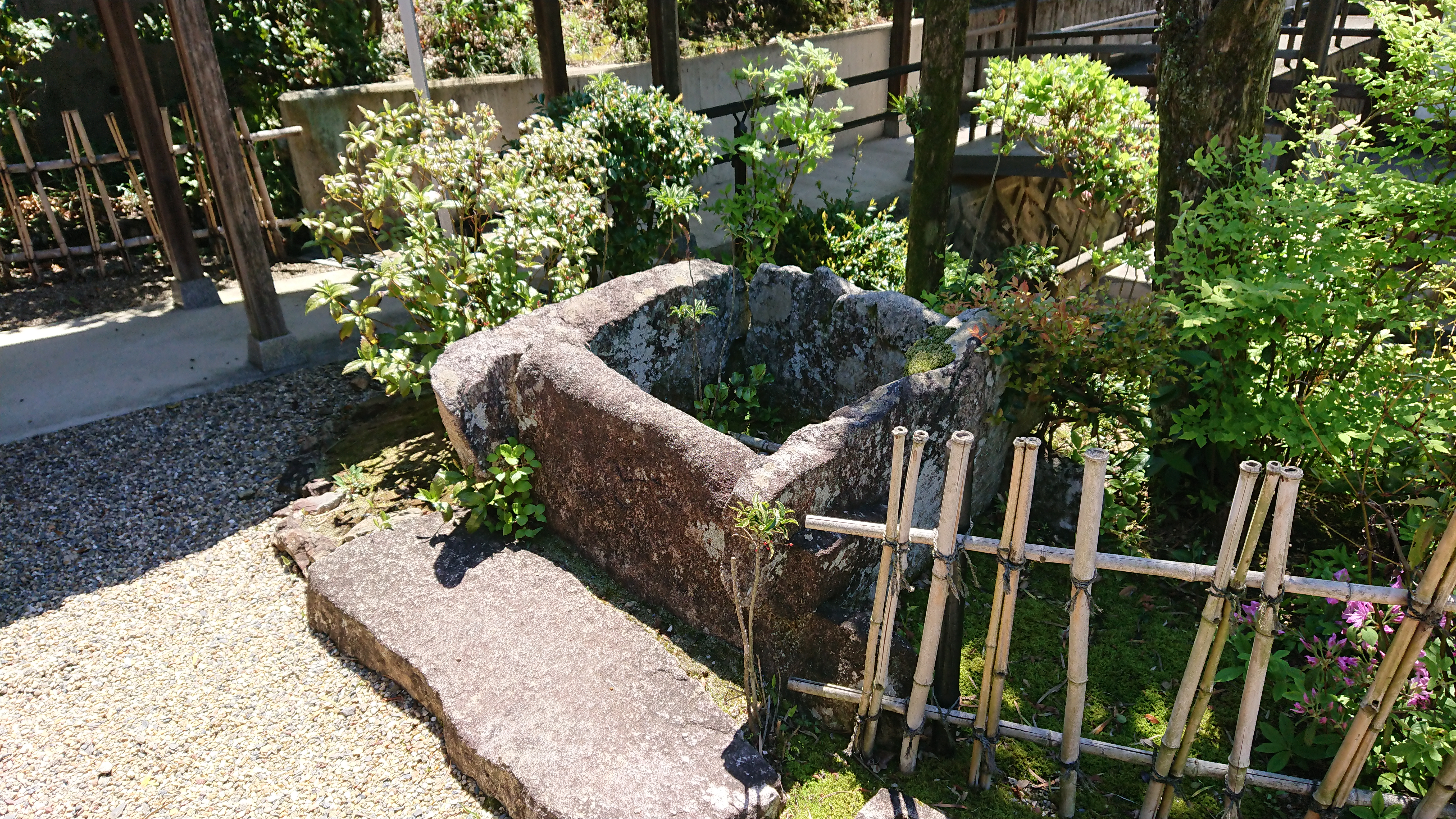 高蔵寺に存在する子安の井戸というもの